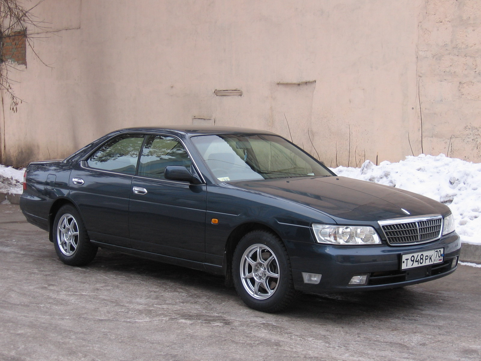 Photo taken in Tomsk, Russia